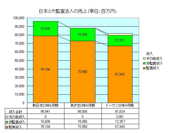 各社決算書公告より作成